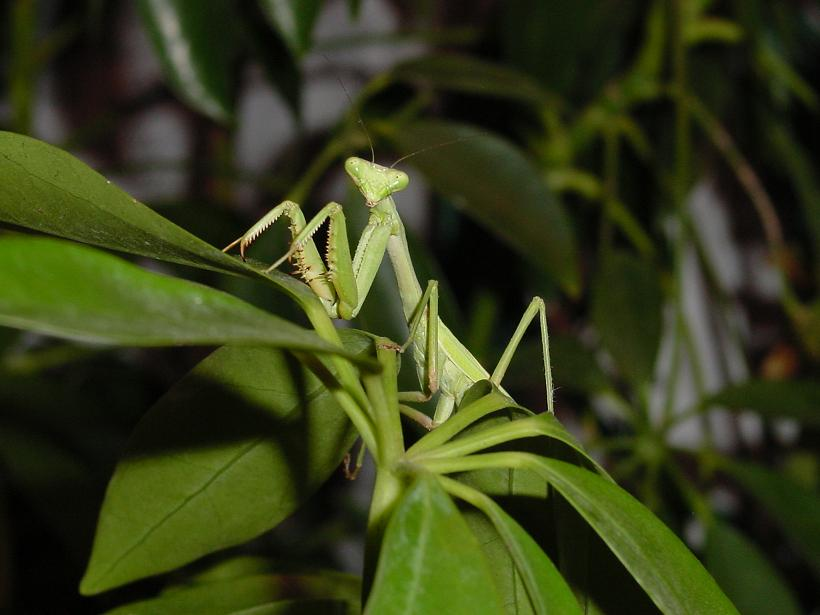 Praying Mantis